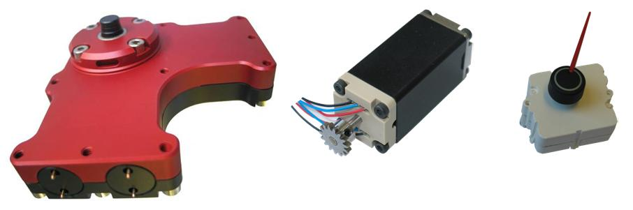 verschiedene Kappelmotoren liks: planarer Kappelmotor, 5Nm Drehmoment mitte: zylindrischer Kappelmotor rechts: Kappelmotor aus Kunststoff als Zeigerinstrument